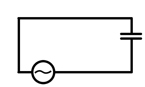 교류회로도